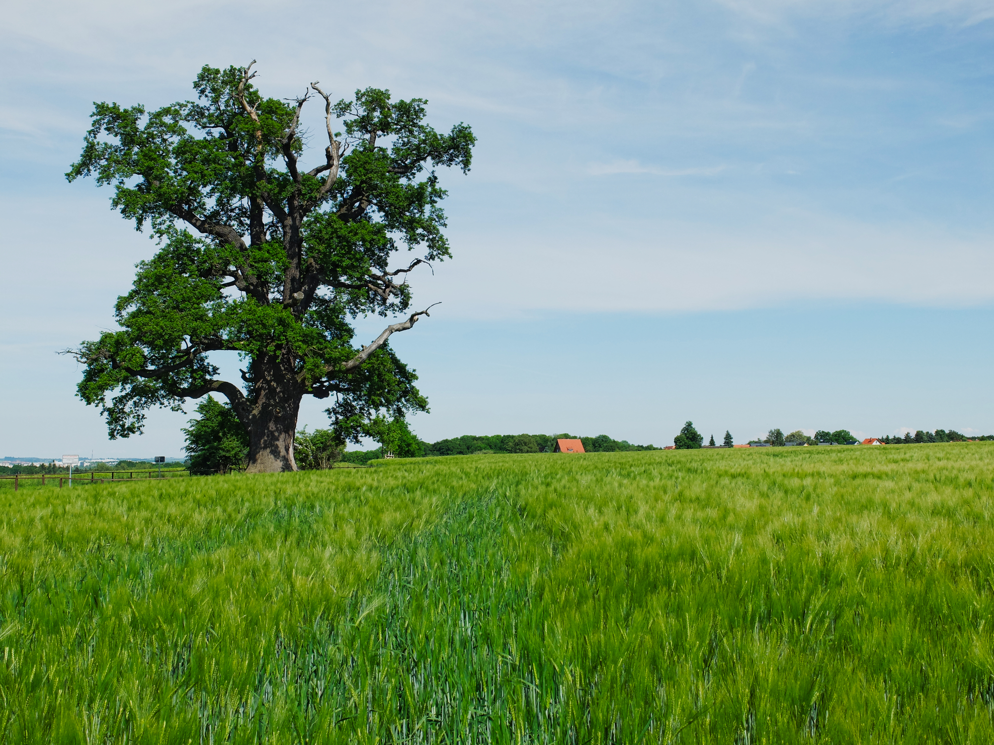 Naturdenkmal „Kalte Eiche“ bei Ernsee (Stadt Gera) in Thüringen, eine Stieleiche, die ca. 450 Jahre alt sein soll